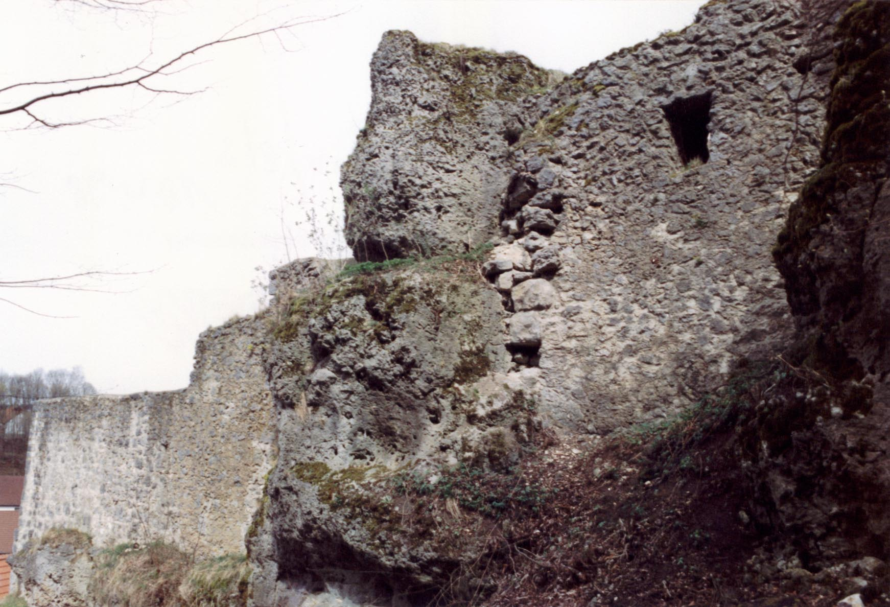 Burgruine Bärnfels, Außenmauern der Vorburg von Oberbärnfels